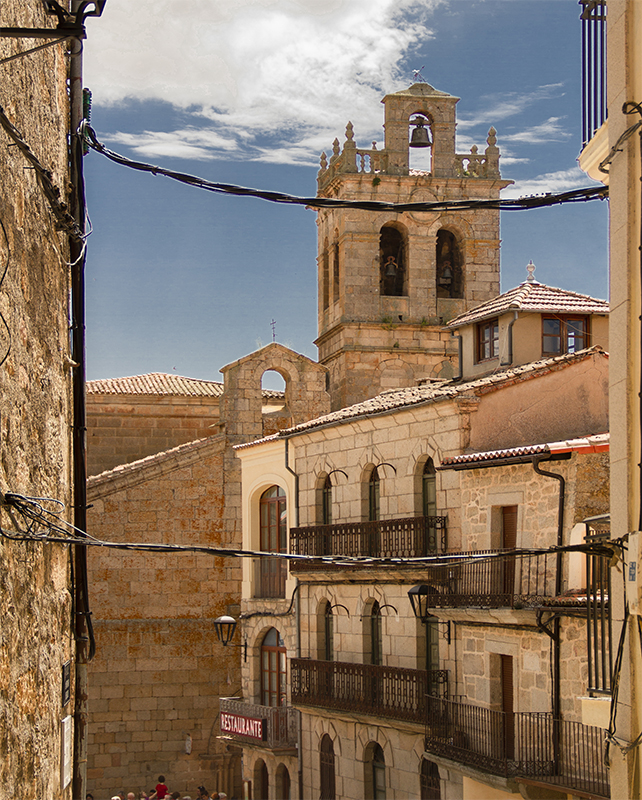 Vista de la plaza y la iglesia desde la Calle Rincón del Castillo, en Fermoselle, provincia de Zamora, Castilla y León, España